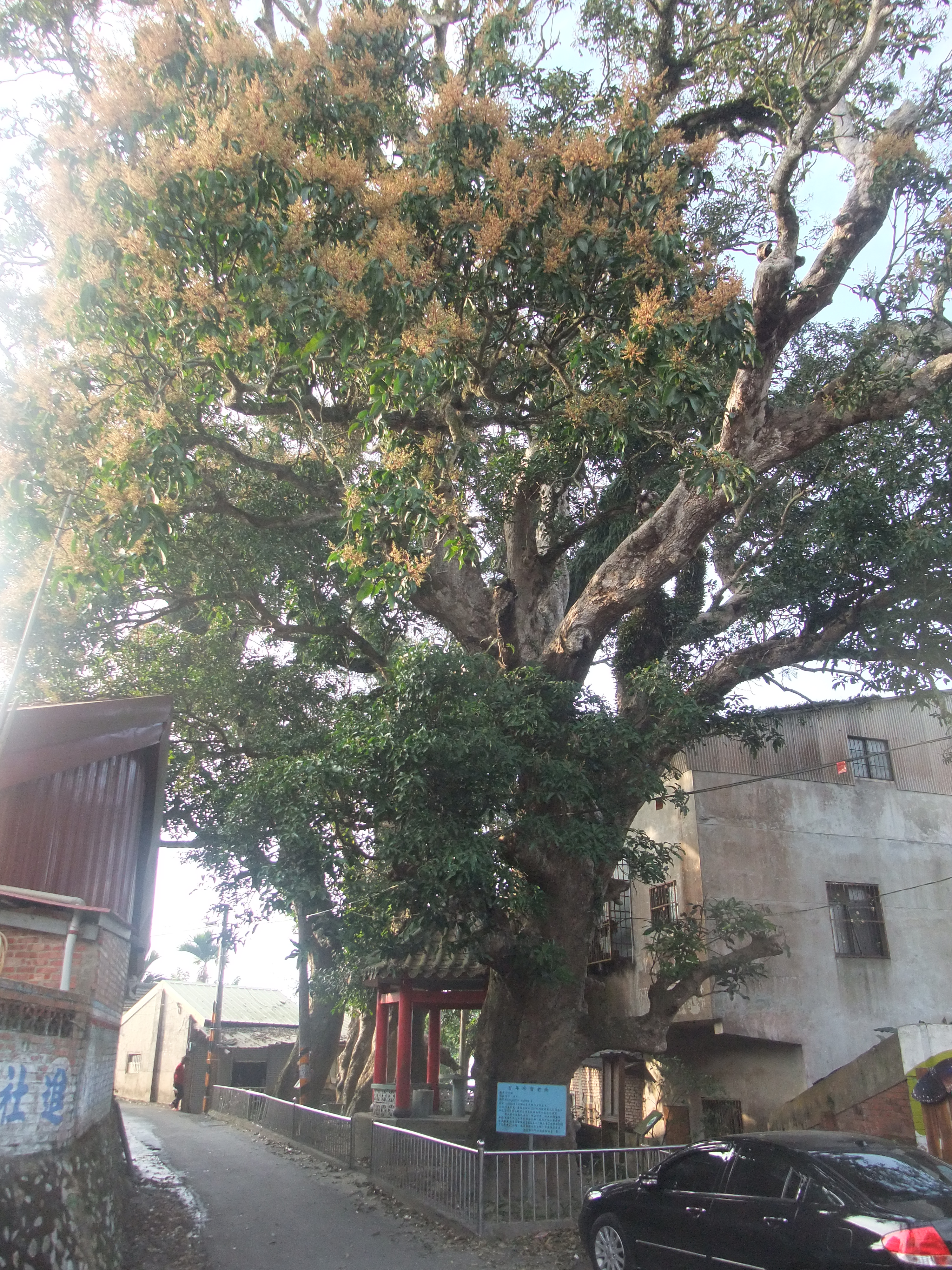 中文（台灣）: 屏東縣林內鄉坪頂村300年老芒果樹。